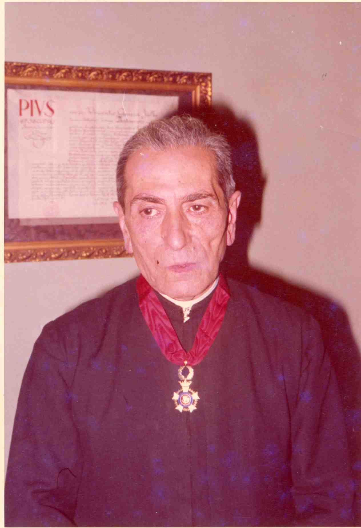 Vicent Garcia Julbe amb la distinció Dert Ilerca